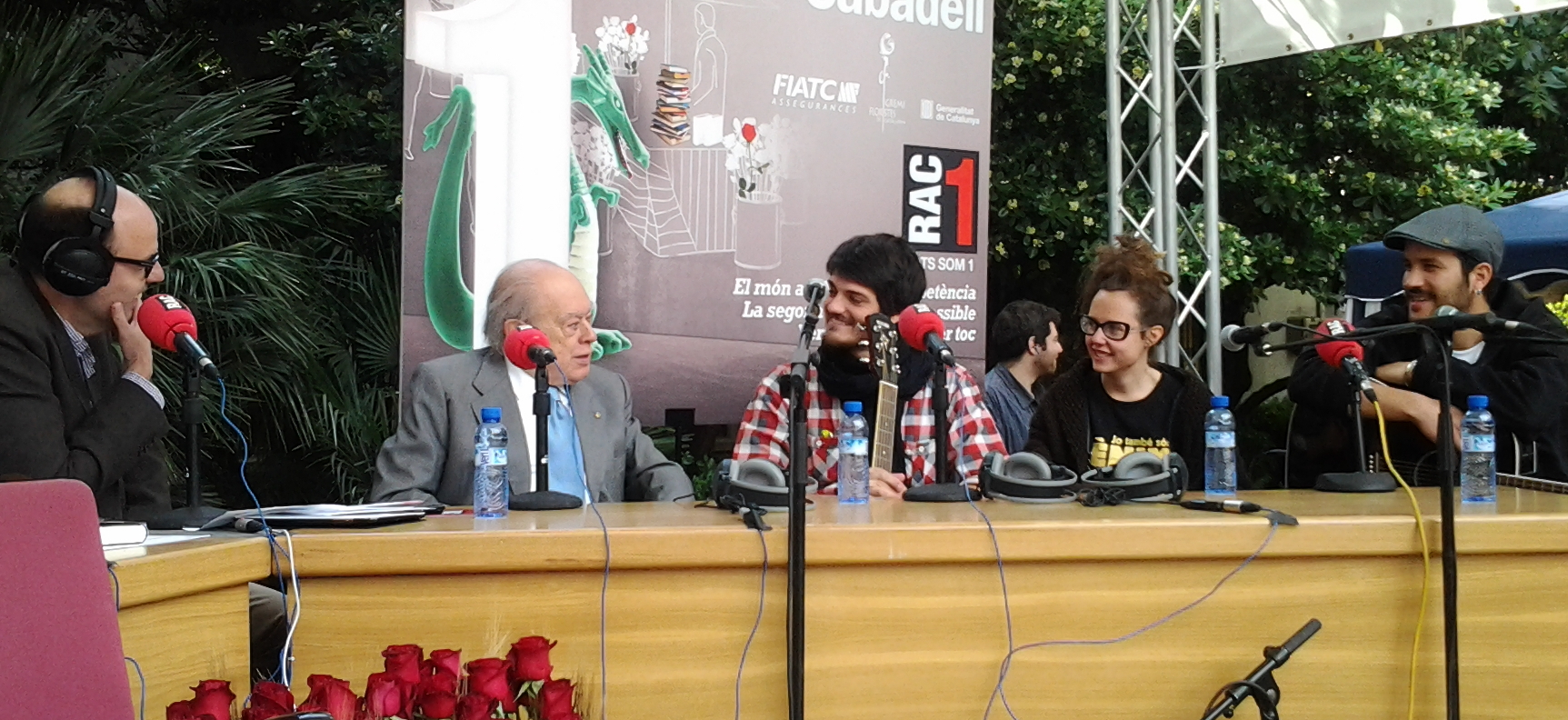 El President Pujol entrevistat a RAC1 amb Els Catarres. Dia de Sant Jordi a Sabadell 2012.